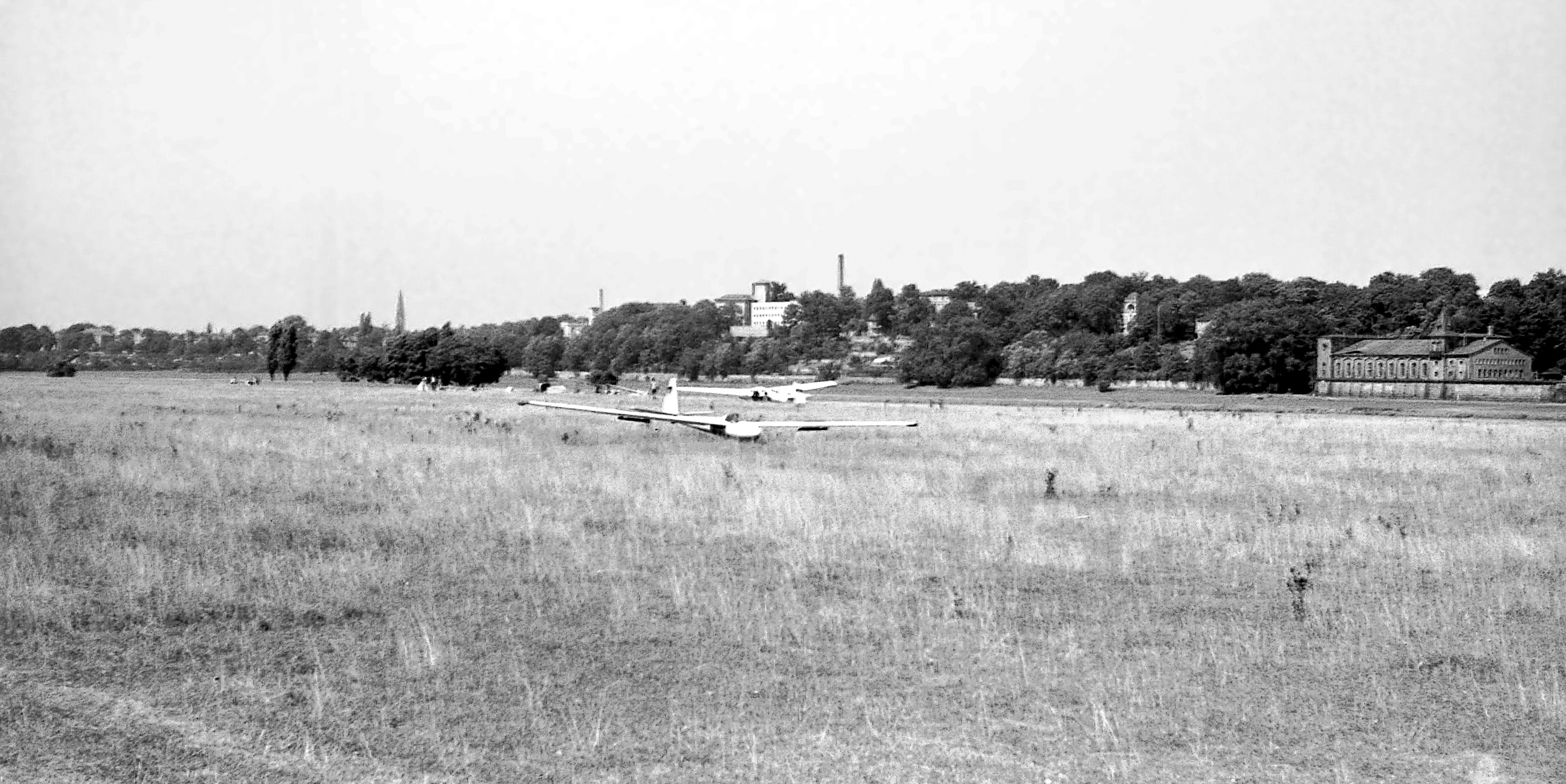 18.08.1971 DDR 8019 [01099] Dresden-Johannstadt: Segelflugplatz (etwa GMP: 51.0614,13.7878) auf den Elbwiesen am Käthe-Kollwitz Ufer. Blick über die Elbe nach Dresden-Neustadt etwa in Höhe der späteren Waldschlößchenbrücke (GMP: 51.063856,13.776616). Hinter dem Flugzeug sieht man die Türme der Villa Stephanie, Bautzner Straße 104 (GMP: 51.066666,13.779493) etwas rechts überragt die Villa Elysium (GMP: 51.066429,13.781645) mit ihrem Turm den hellen Neubau der Stasi. Ganz rechts im Bild das Wasserwerk Saloppe (GMP: 51.064890,13.788108). [F19710812A62.JPG]19710818210NR.JPG(c)Blobelt